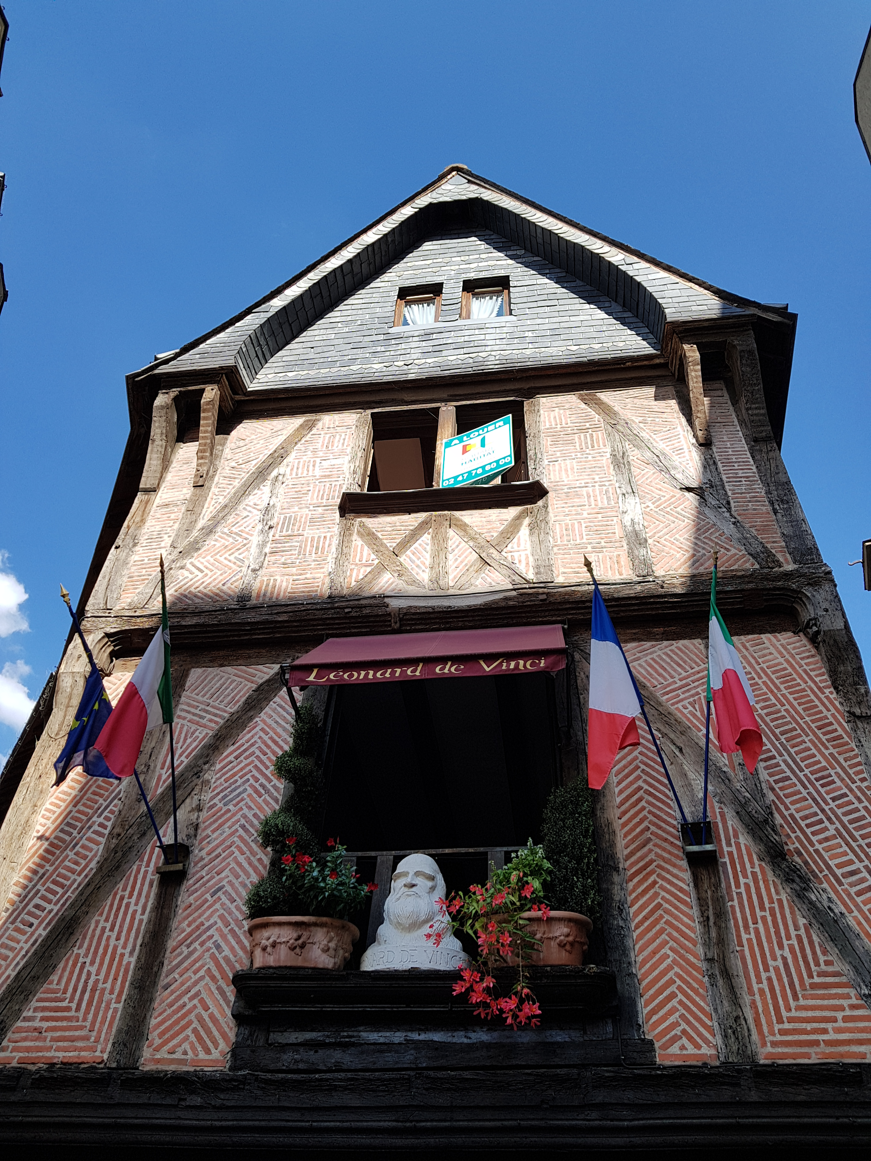 Vieux tours, 19 rue de la Monnaie, maison XIIIe, XIVe et XVe siècle